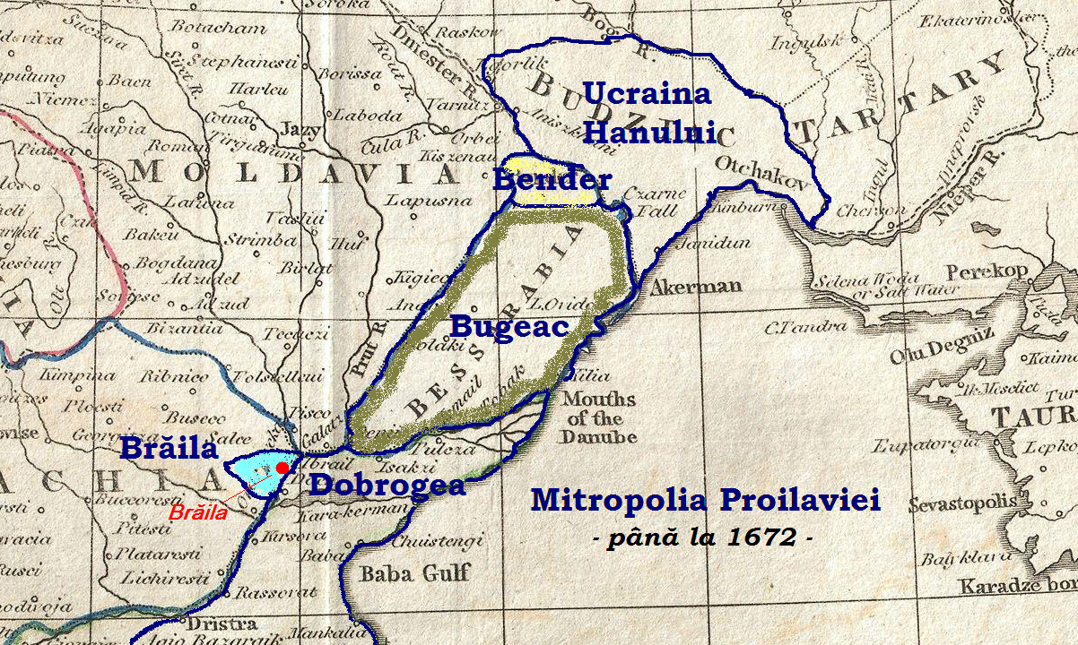 Harta arată teritoriile aflate sub jurisdicţia Mitropoliei Proilaviei, până la 1672